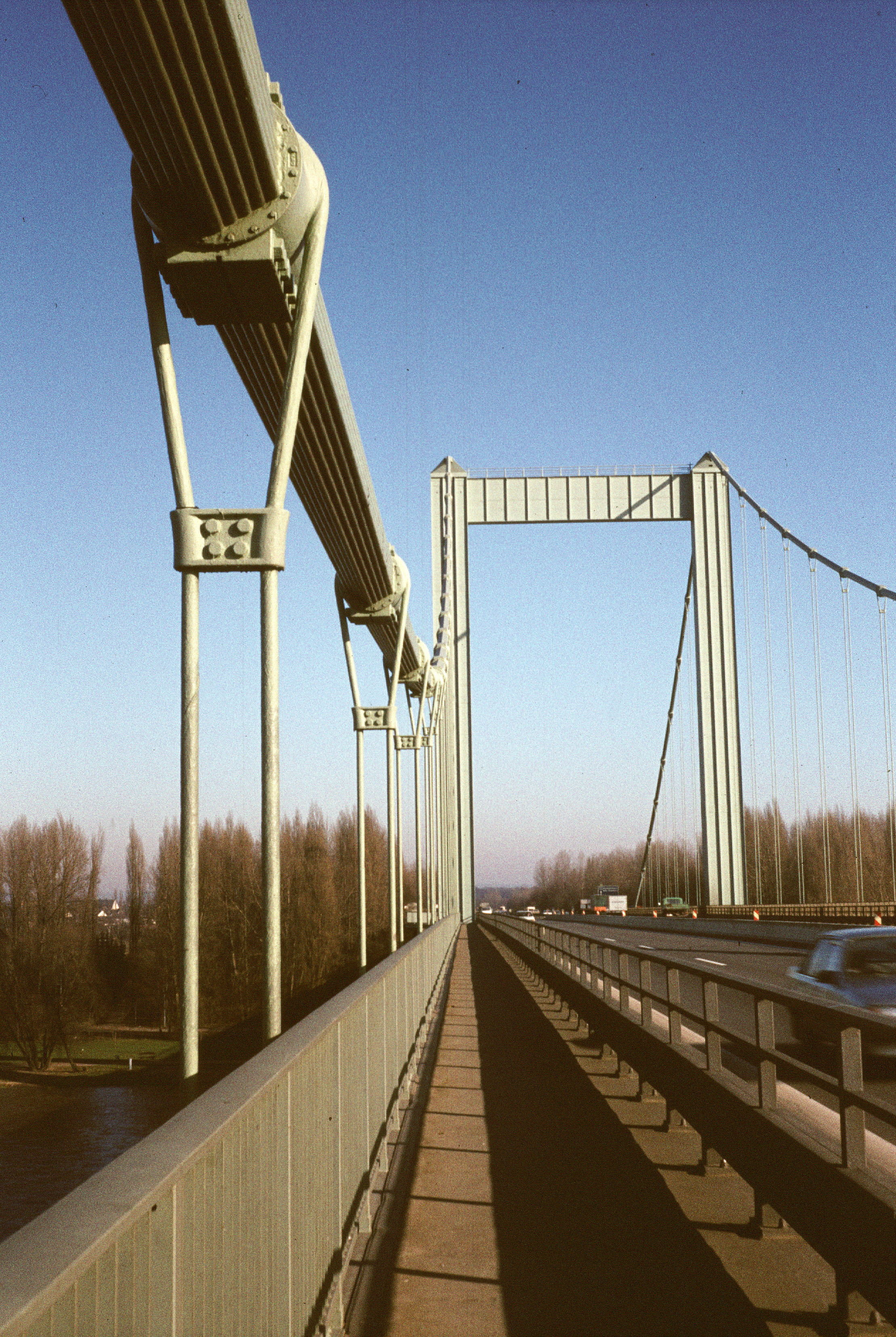 Rodenkirchener Autobahnbrücke vor dem Erweiterungsbau. In Höhe des Fotostandortes ist inzwischen der Mittelstreifen.